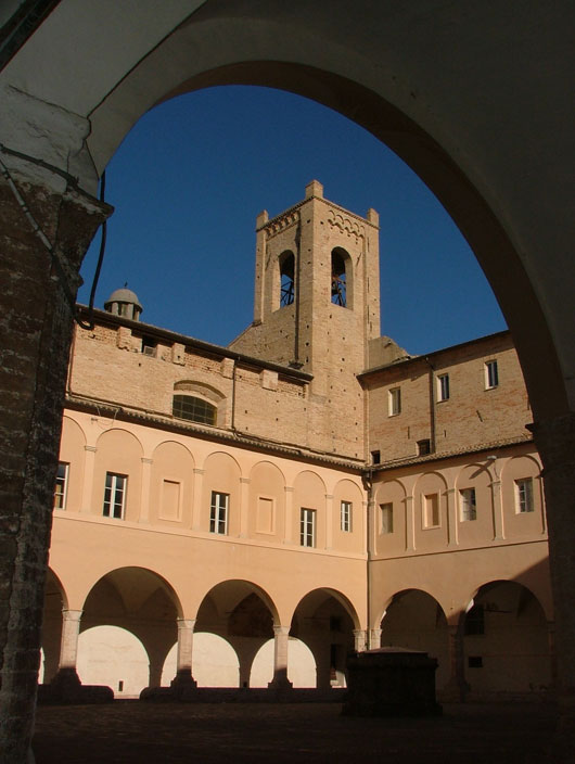 Recanati, Chiostro di Sant'Agostino e Torre del passero solitario